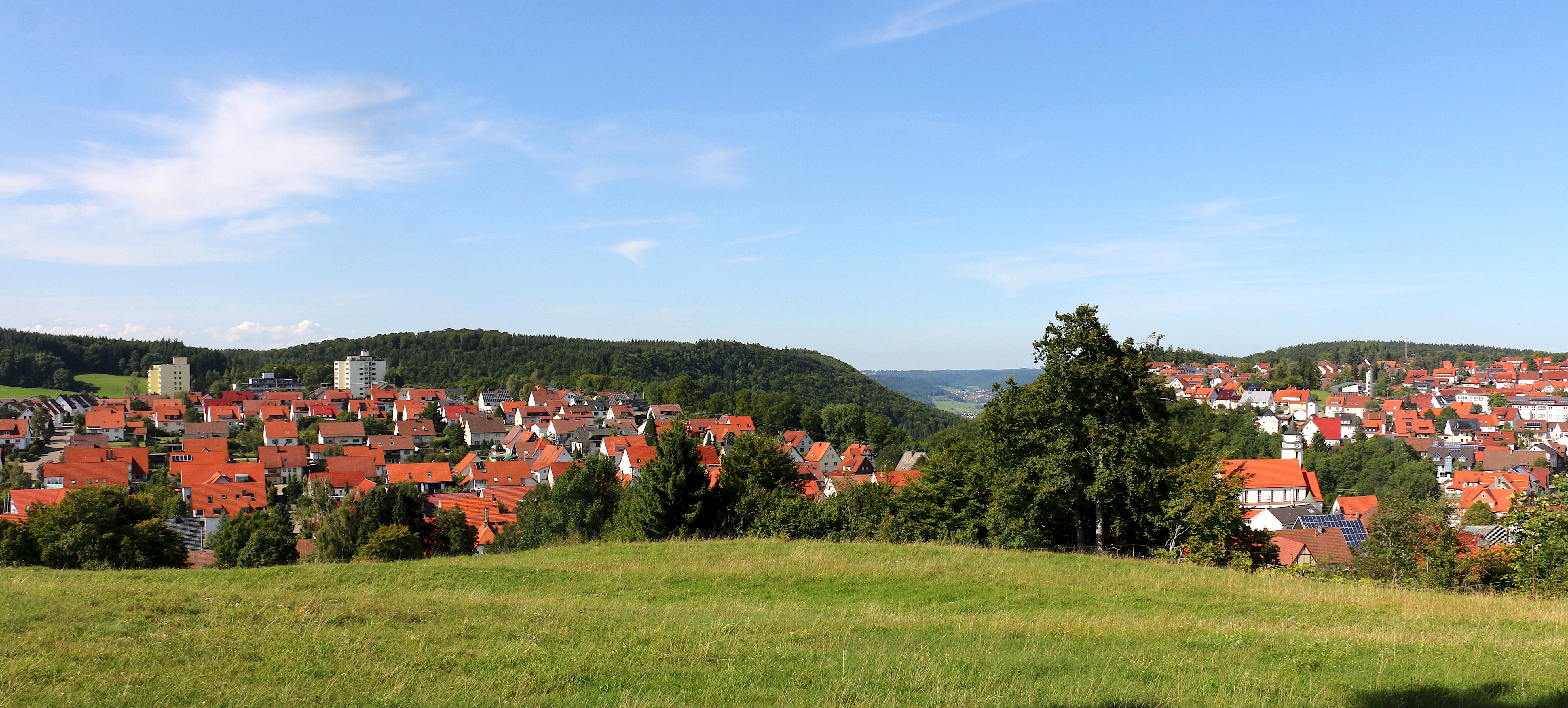 Blick über Meßstetten in Baden-Württemberg, Germany (2017)